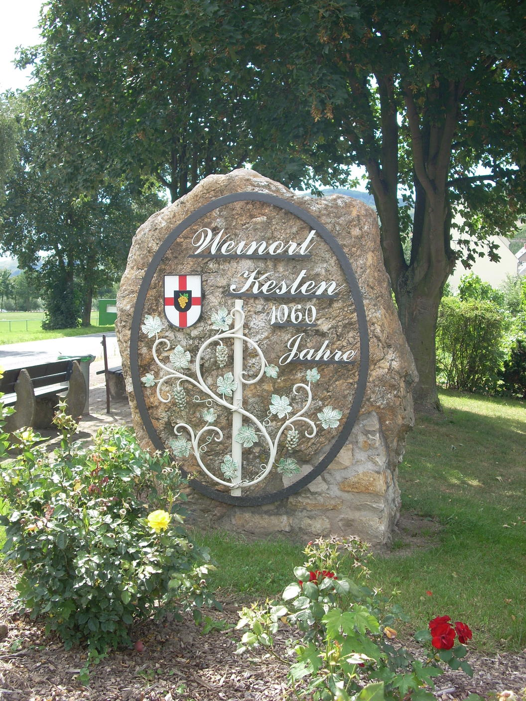 The Entrance Mark in Kesten (Landkreis Bernkastel-Wittlich, Bundesland Rheinland-Pfalz, Deutschland)